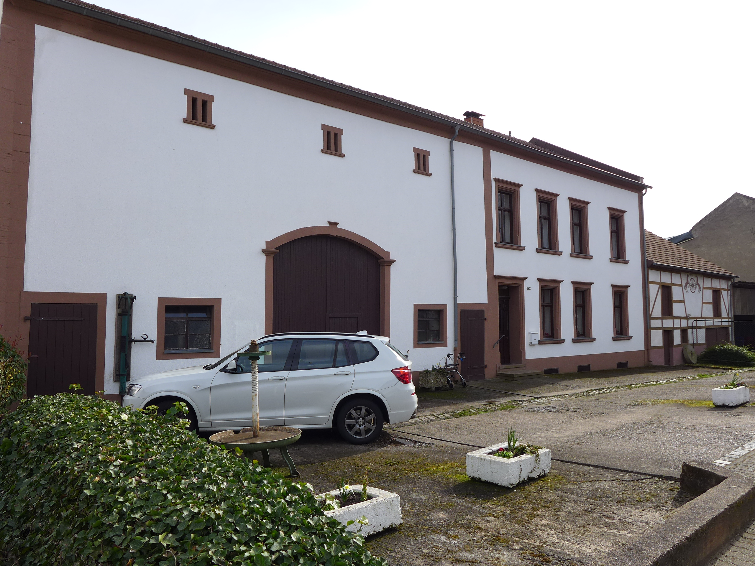 Diefflen, Traditionelles Südwestdeutsches Quereinhaus in der Nalbacher Straße (Kirchenweg)